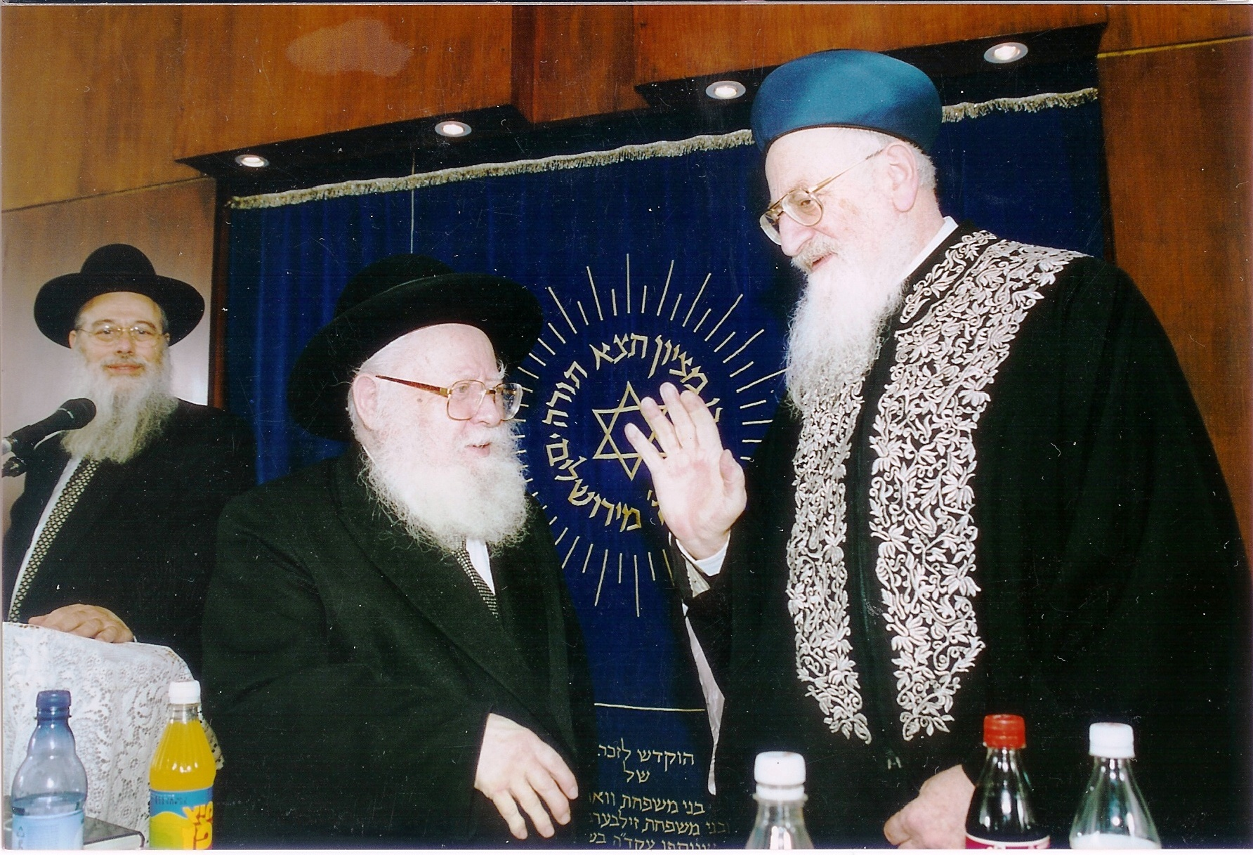 ישיבת מרכז הרב.